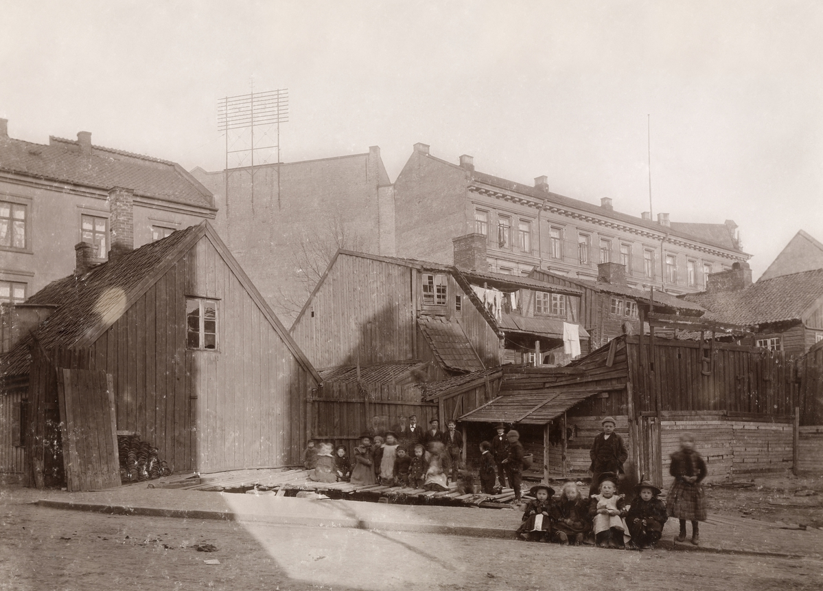 Skolestredet 3-7, revet 9. mai 1899. Avbildet er også Skolegata 10. Ukjent fotograf. Fra Byhistorisk samling hos Oslo Museum.